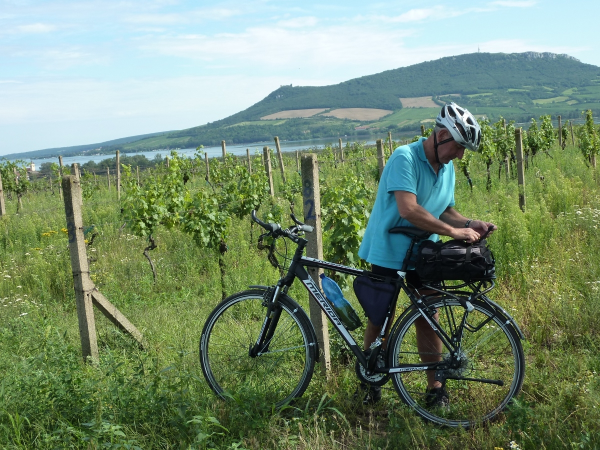 Volný čas Leoš Heger nejraději spojuje se sportem.